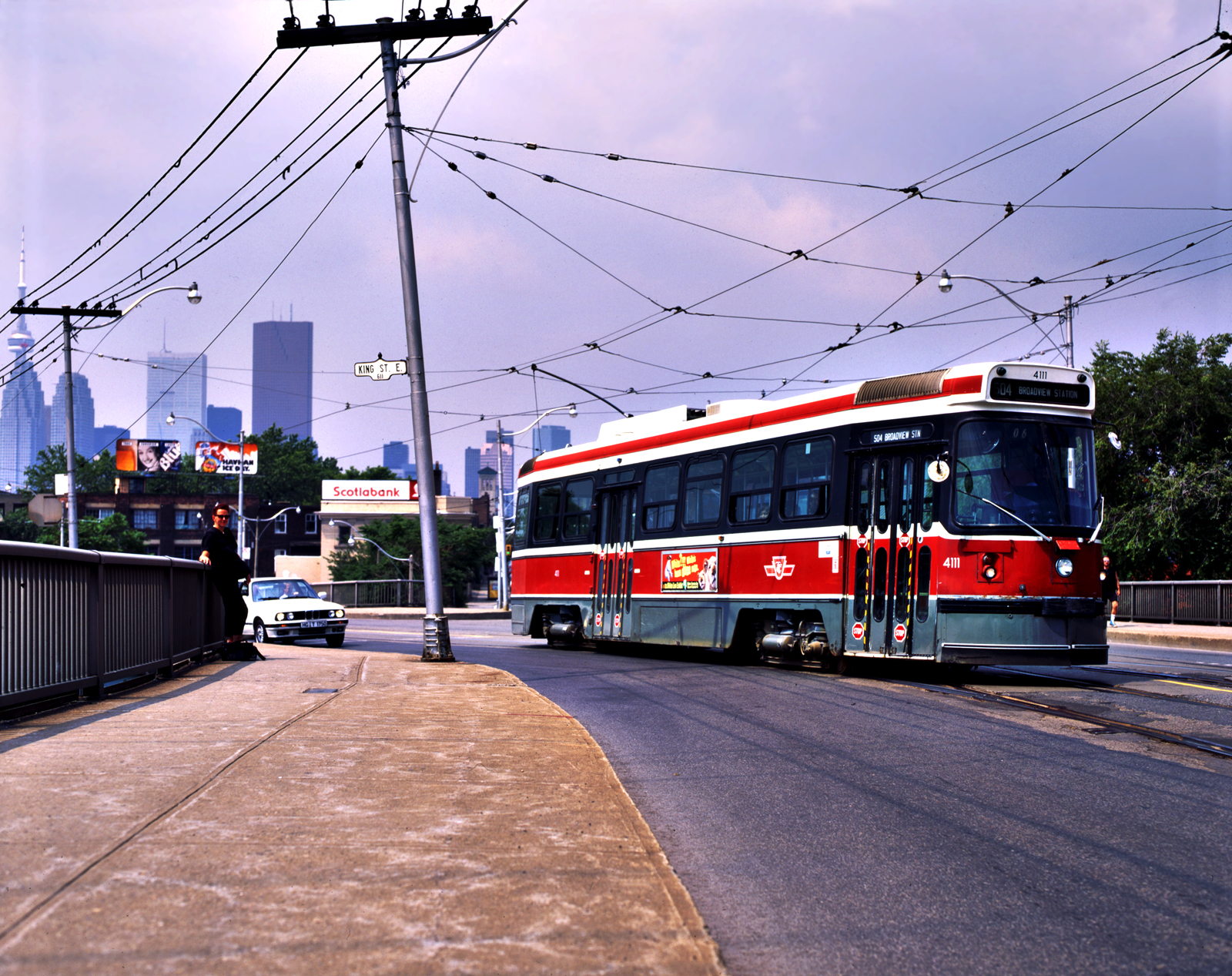 Zelfgemaakte media (gescande 6x7 dia)